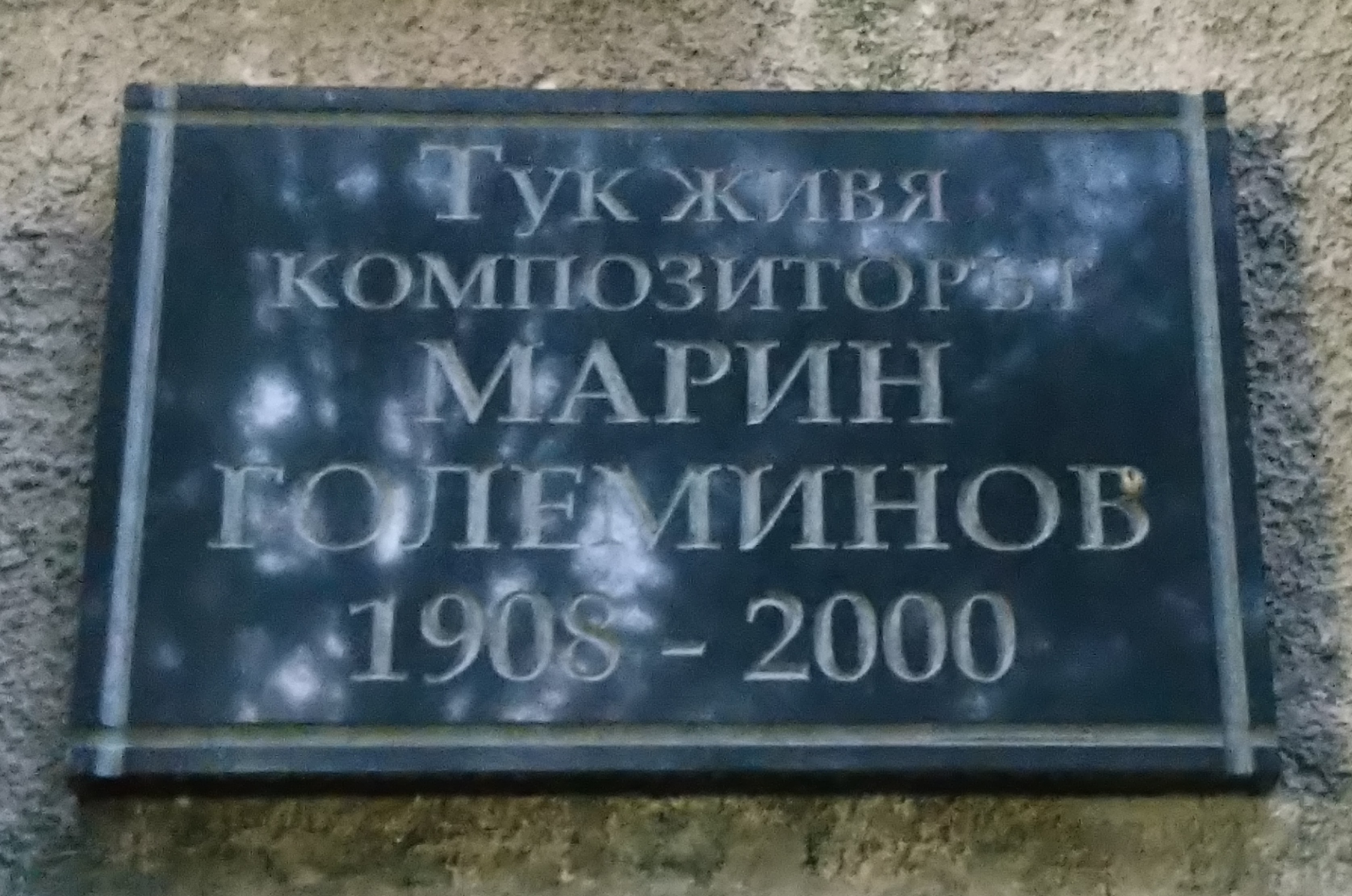 Паметна плоча на композитора Марин Големинов, ул. Бузлуджа 45, София